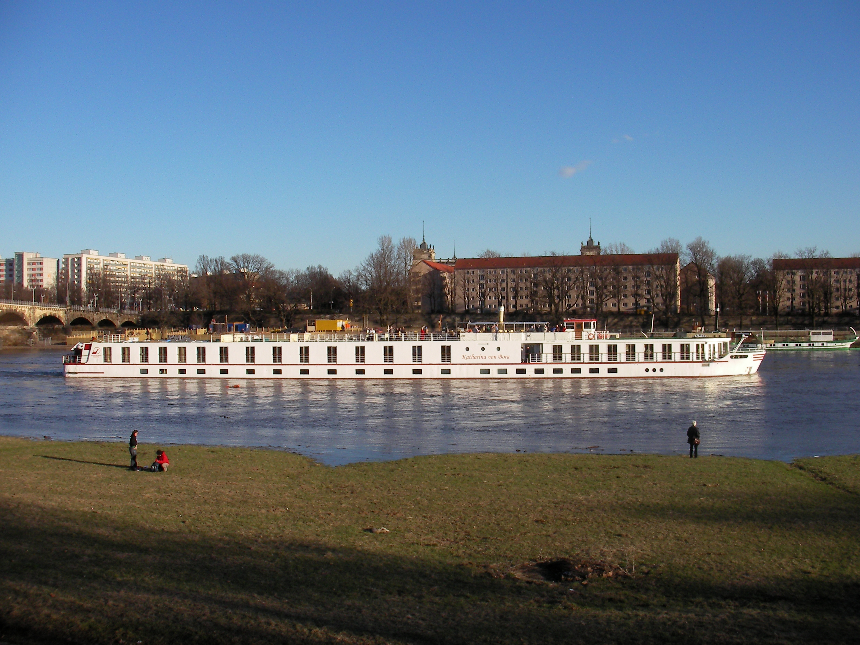 Flußkreuzfahrtschiff MS Katharina von Bora in Dresden an der Albertbrücke